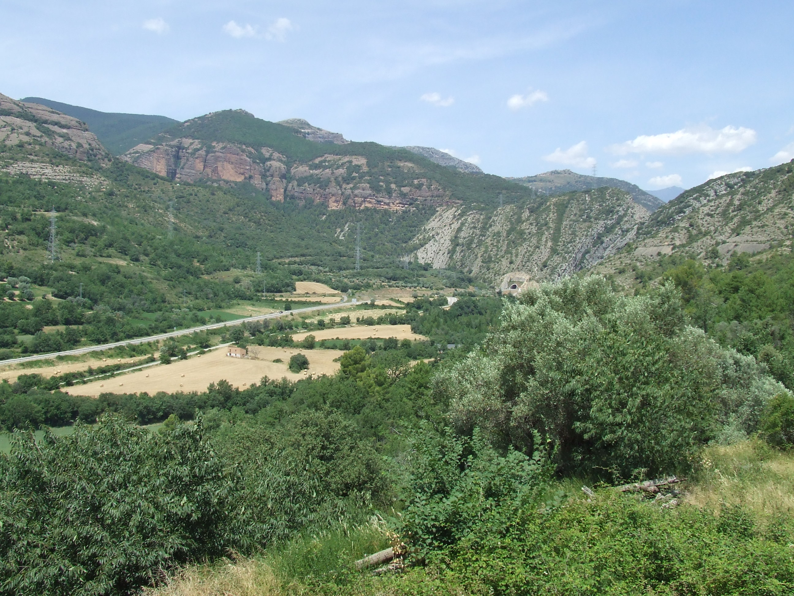 La vall del Flamisell a prop d'Erinyà (Conca de Dalt, Pallars Jussà)